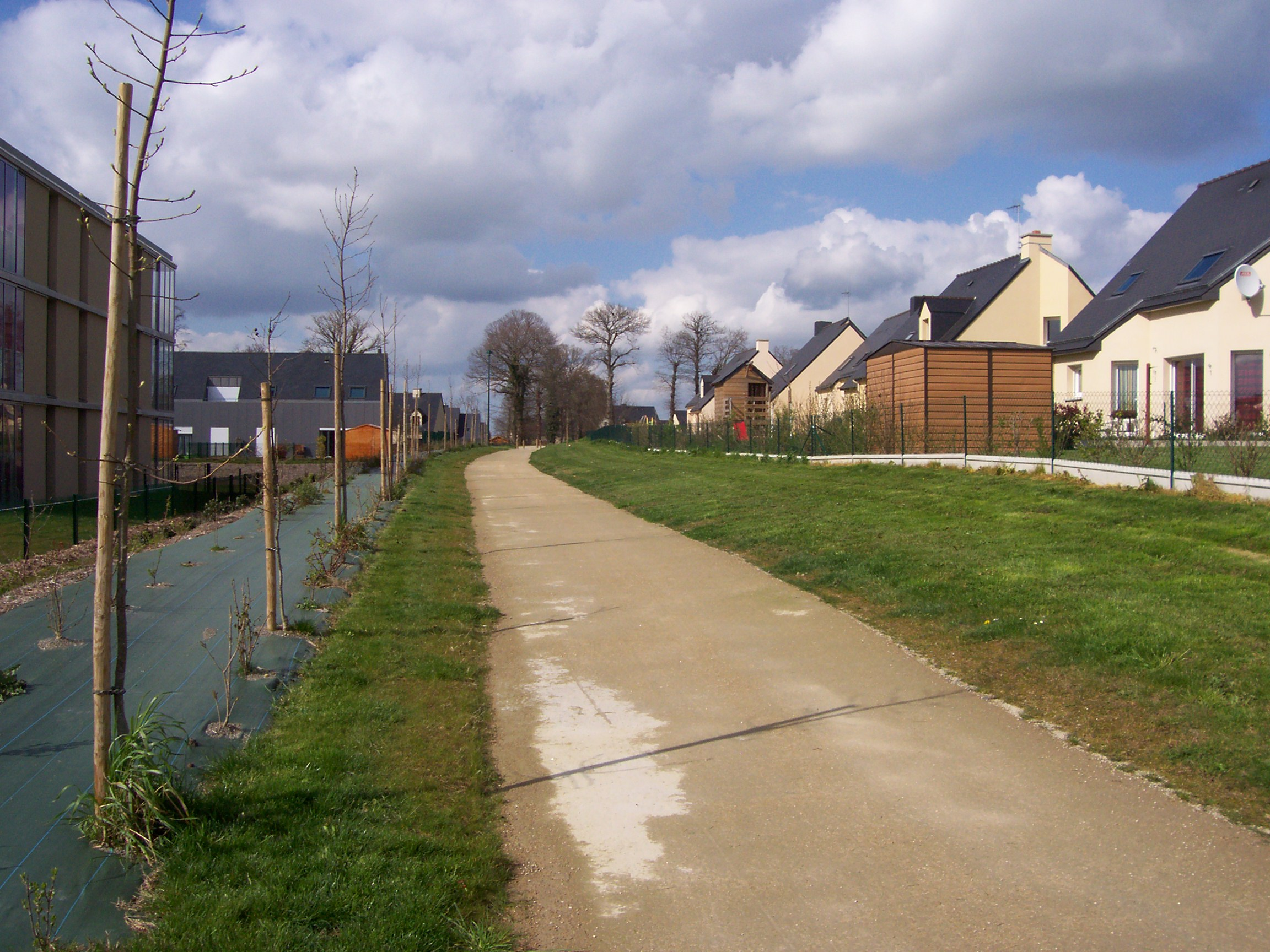 Large chemin dans la commune de Mordelles, Ille et Vilaine, France.